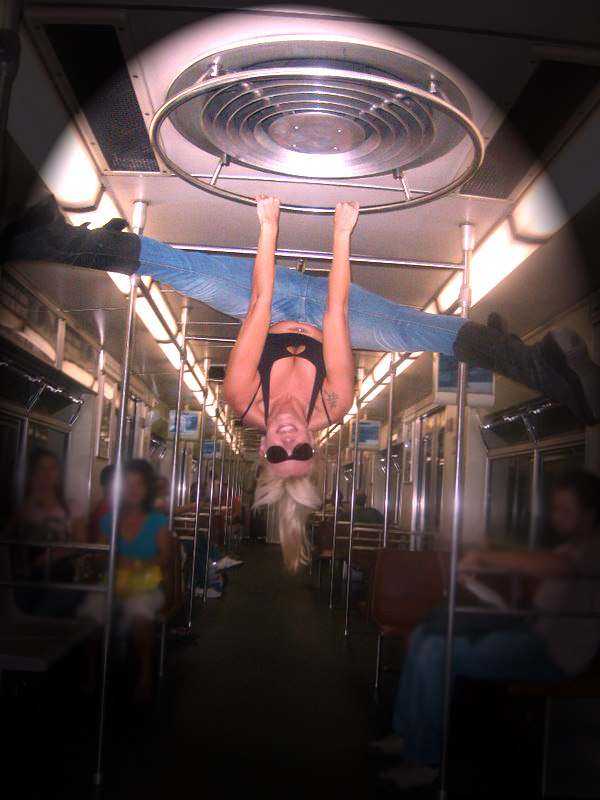 Uma pole dancer, realizando pole street dentro de um metrô.